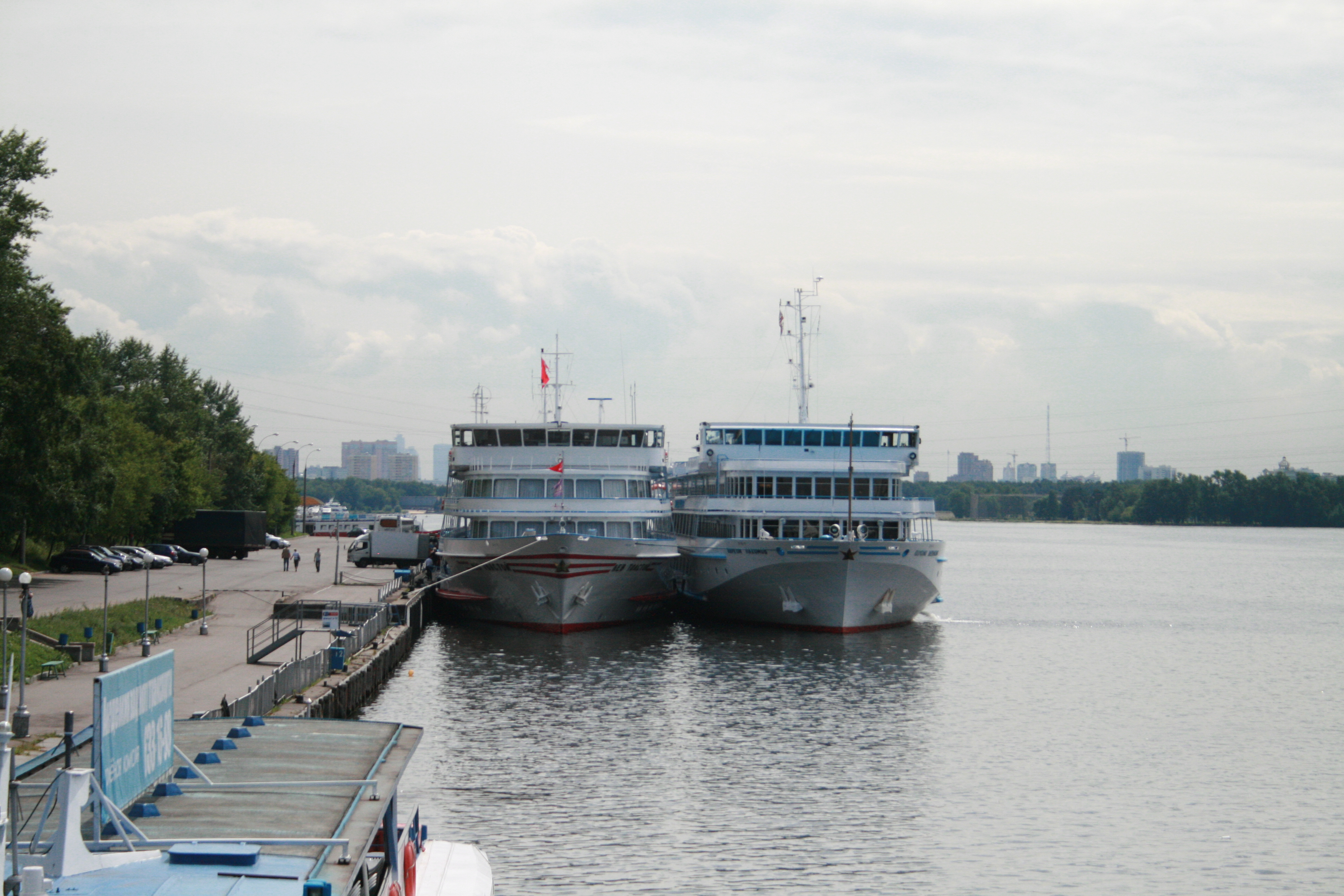 Теплоходы «Лев Толстой» и «Наком Пахомов» у Северного речного вокзала.